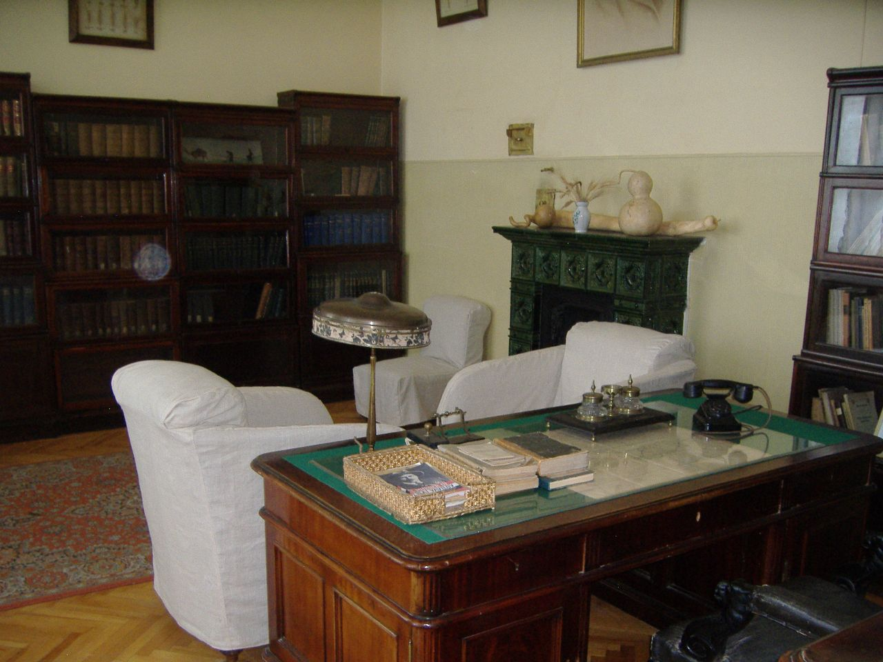 Vavilov's office